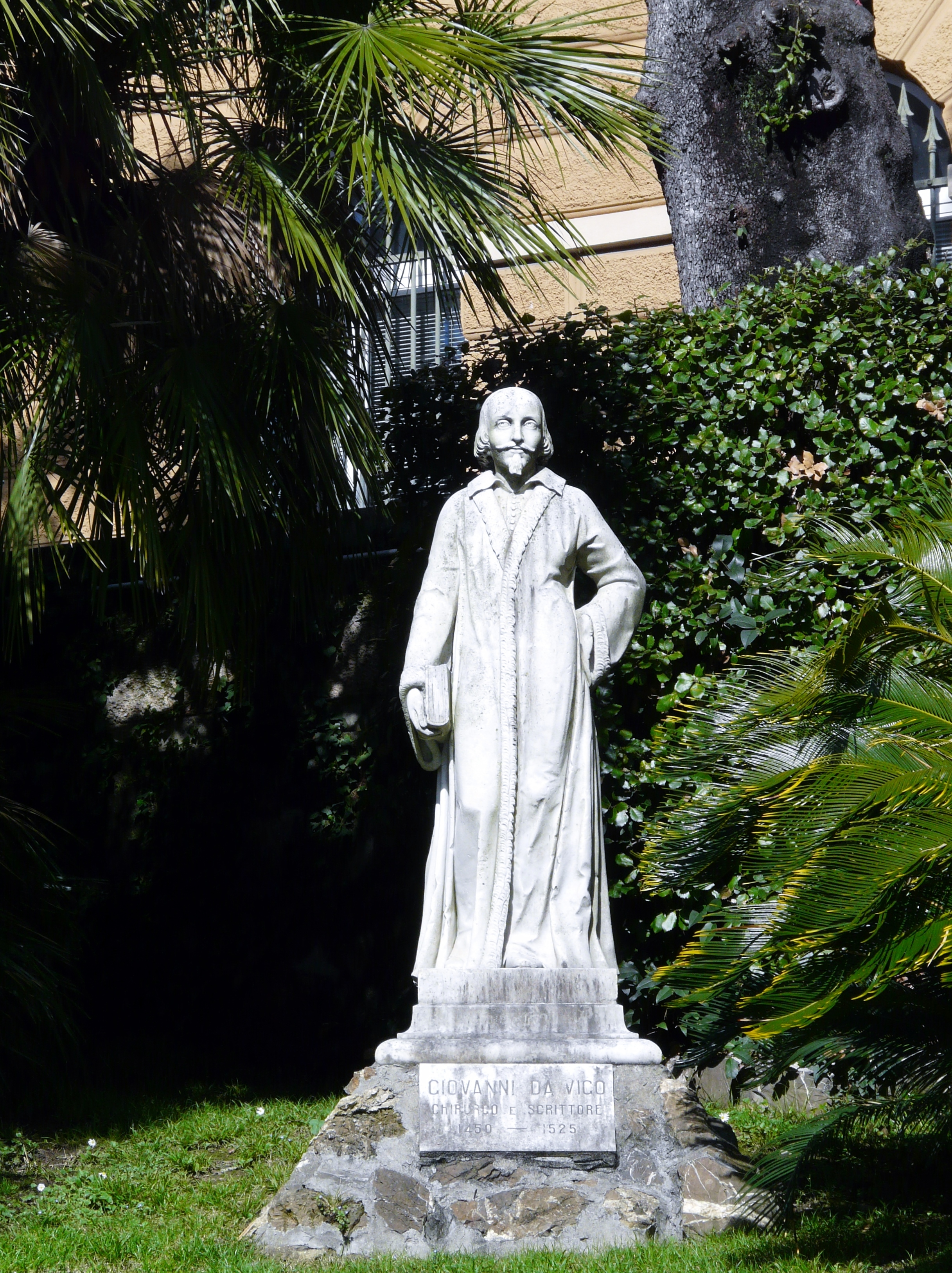 Monumento a Giovanni da Vigo nell'aiuola antistante l'ex ospedale civile di Rapallo, Liguria, Italia